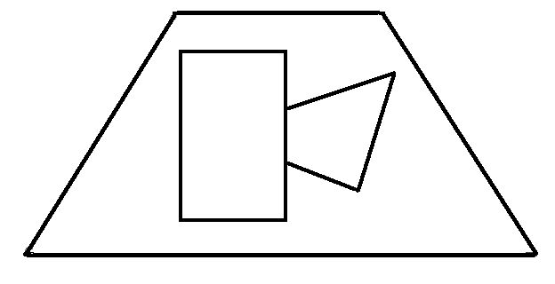 Обозначение звукового оповещателя согласно ГОСТ 28130-89